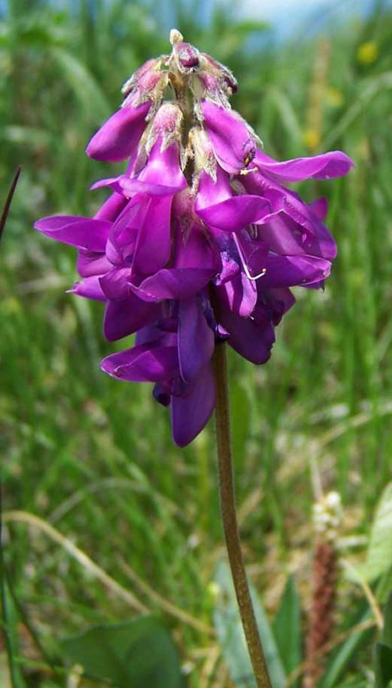 Hedysarum hedysaroides (pl. siekiernica górska)